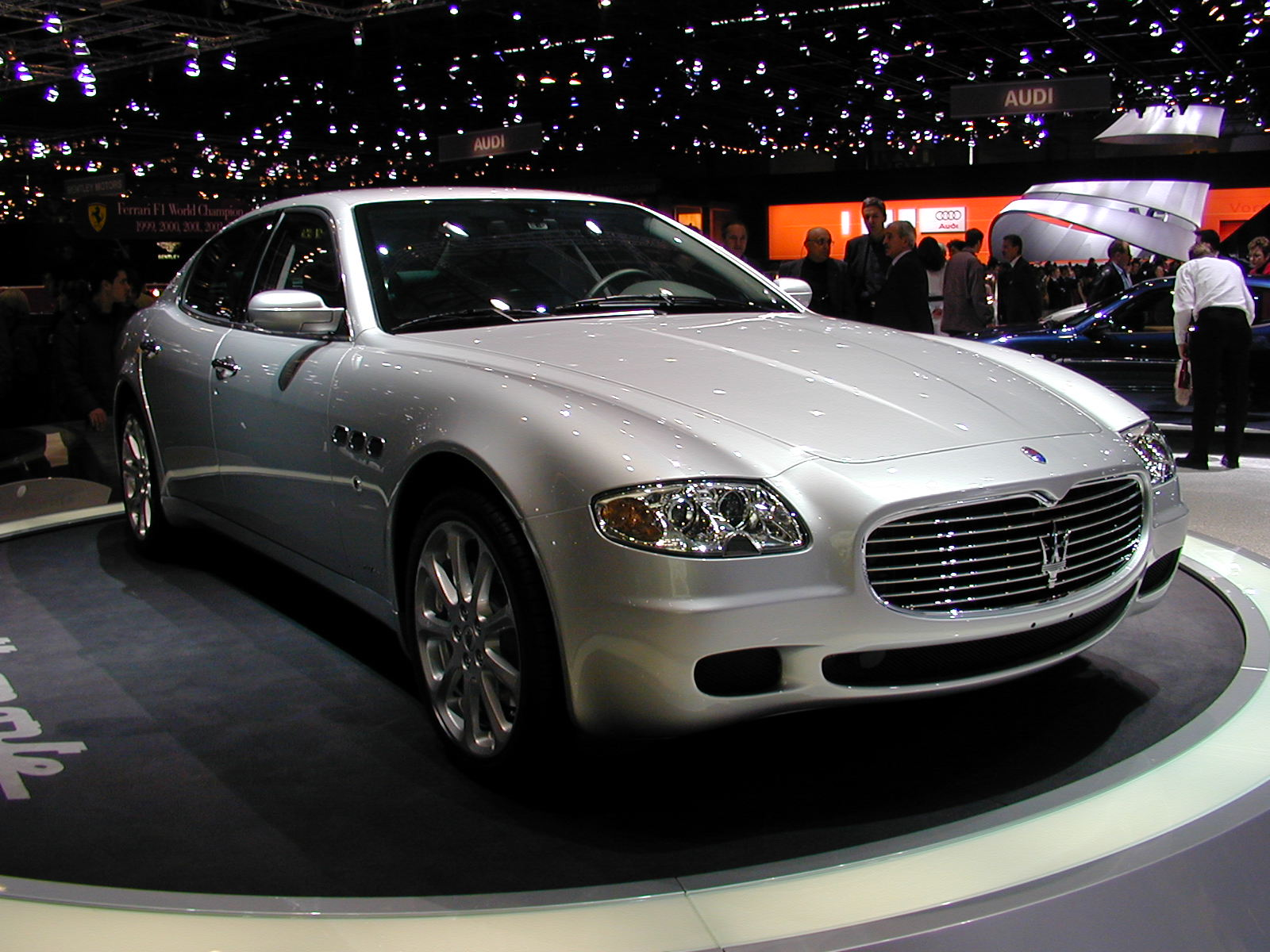 Salon de Genève 2004 SAG2004 232 Maserati Mk IV